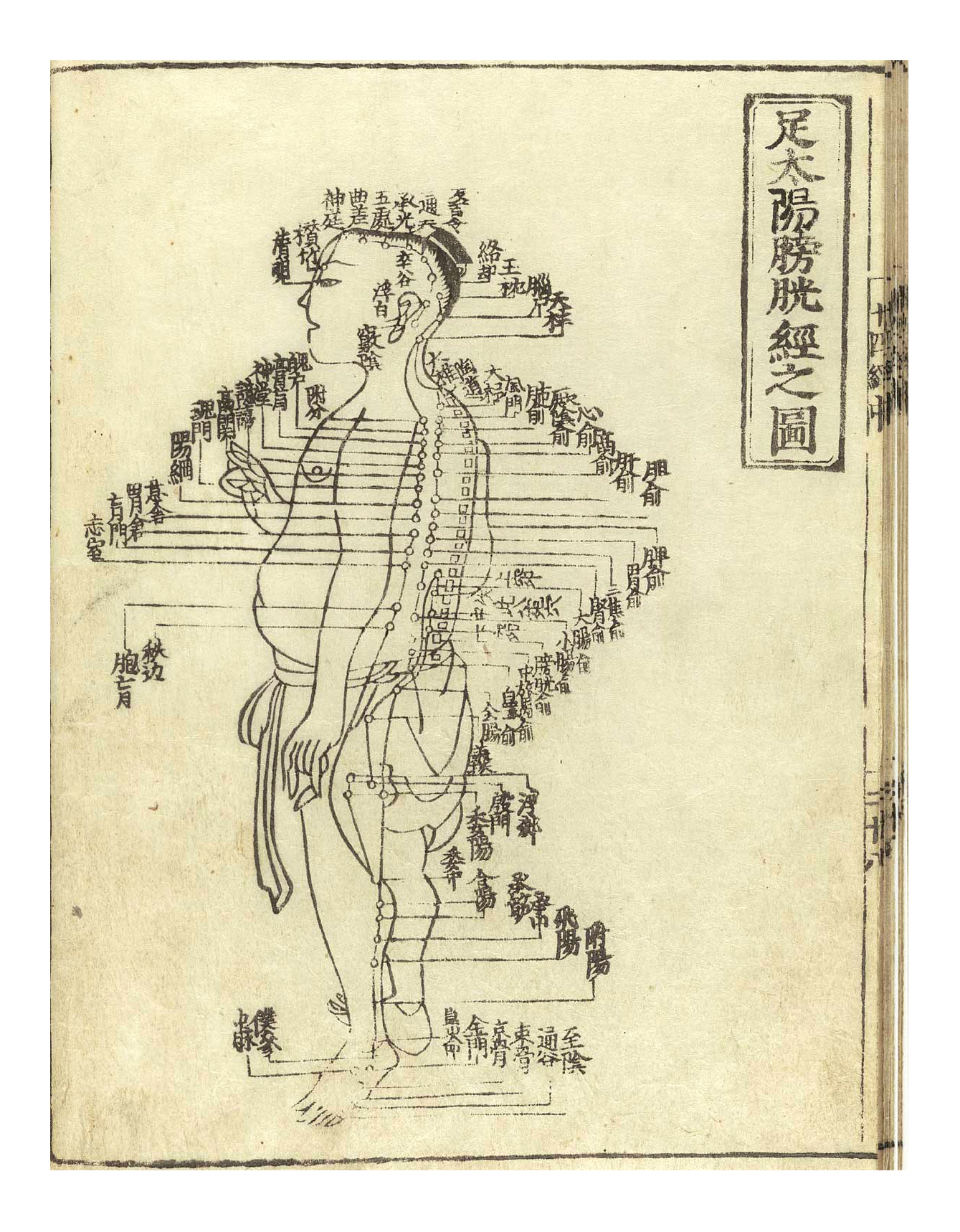 Abbildung von Akupunkturpunkten